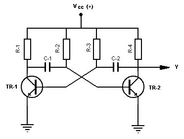 Figura 1.- Circuito multivibrador astable Schematic of a astable multivibrator. NOTE: This schematic, drawn by my, was before uploaded to Wikipedia in Spanish , but I believe that now it is better in Commons.